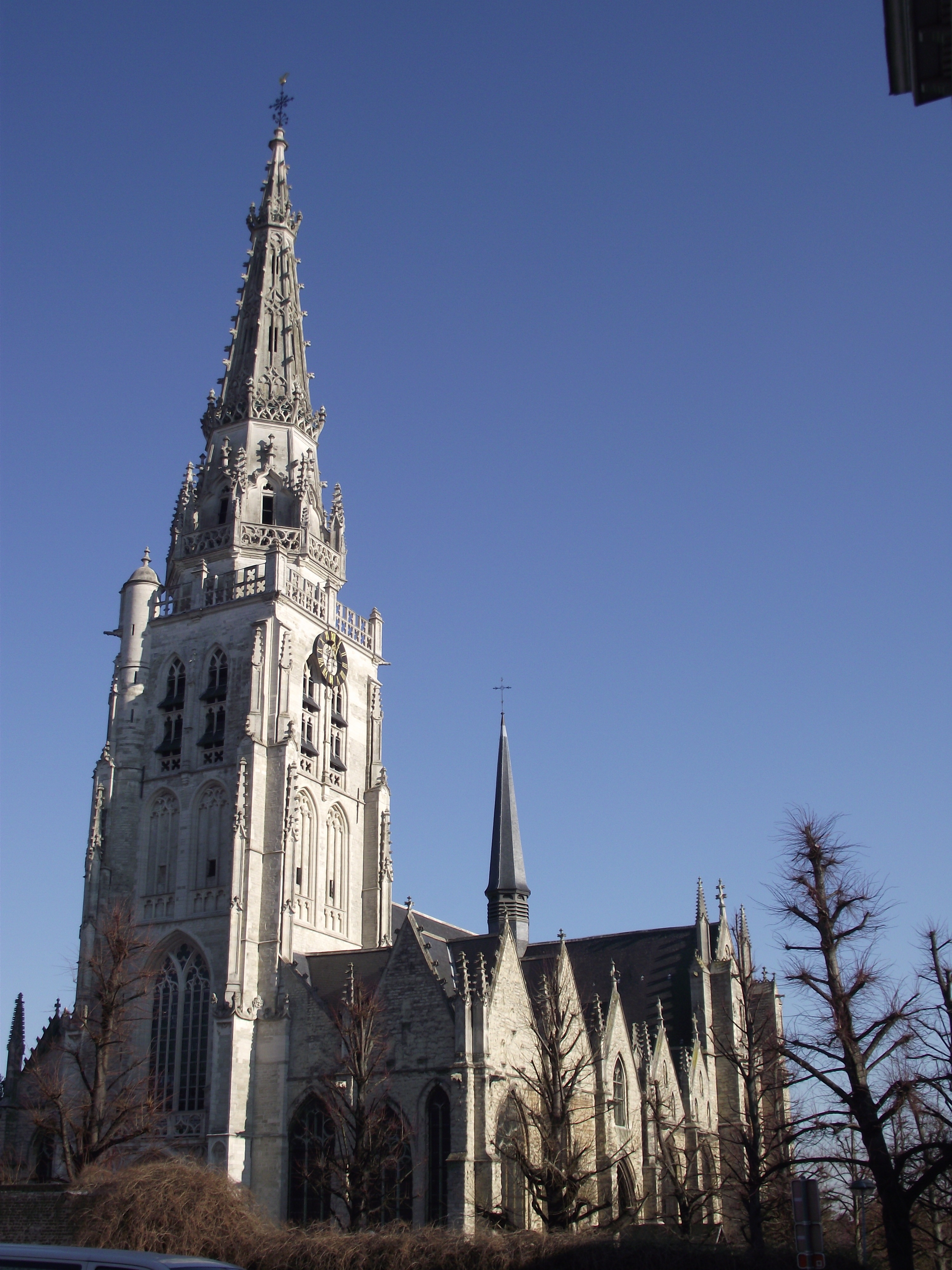 Anderlecht, Collegiata dei Santi Pietro e Guido, 1350-1527